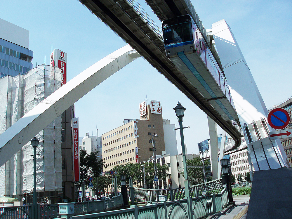 千葉中心部を走る千葉都市モノレール。2006年8月 CLP撮影。